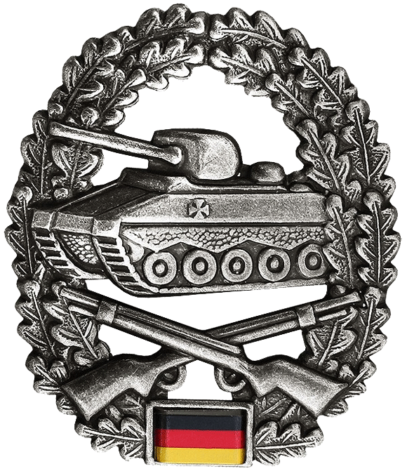 Barettabzeichen der Panzergrenadiertruppe der Bundeswehr Barettfarbe: Jägergrün Maße: Hoch: 53mm Breit: 46mm Ausführung: altsilber, Metall